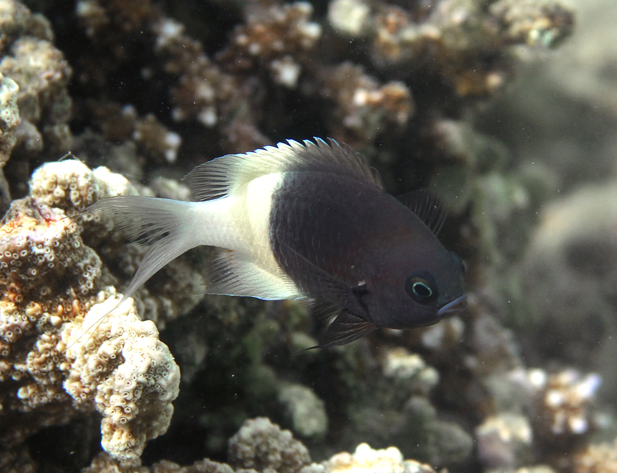 Une castagnole bicolore (Chromis dimidiata) à la Réunion.